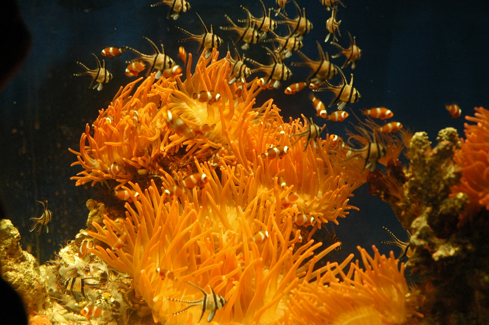 Barriera corallina (Acquario di Genova, Italy)